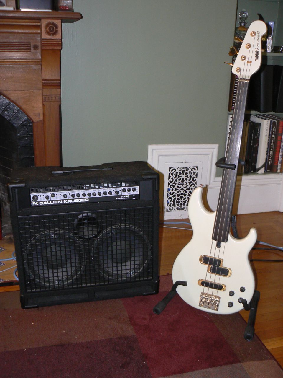 Yamaha BB3000AF Gallien-Krueger 700RB-210